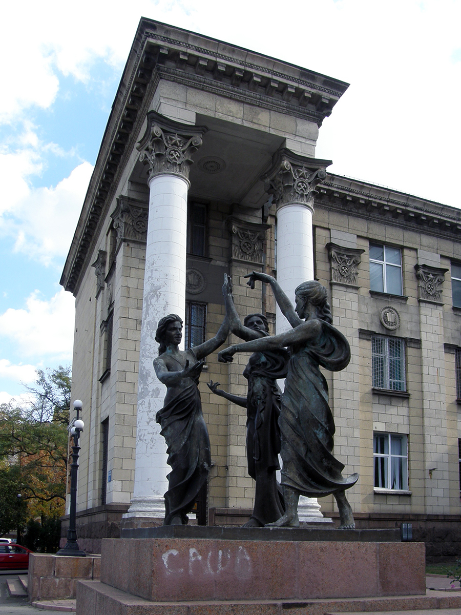 музы у дома техники, Луганск